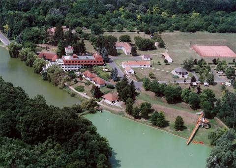 Lake Kék, Rágniczapuszta, Lengyeltóti, Hungary, aerialphotography